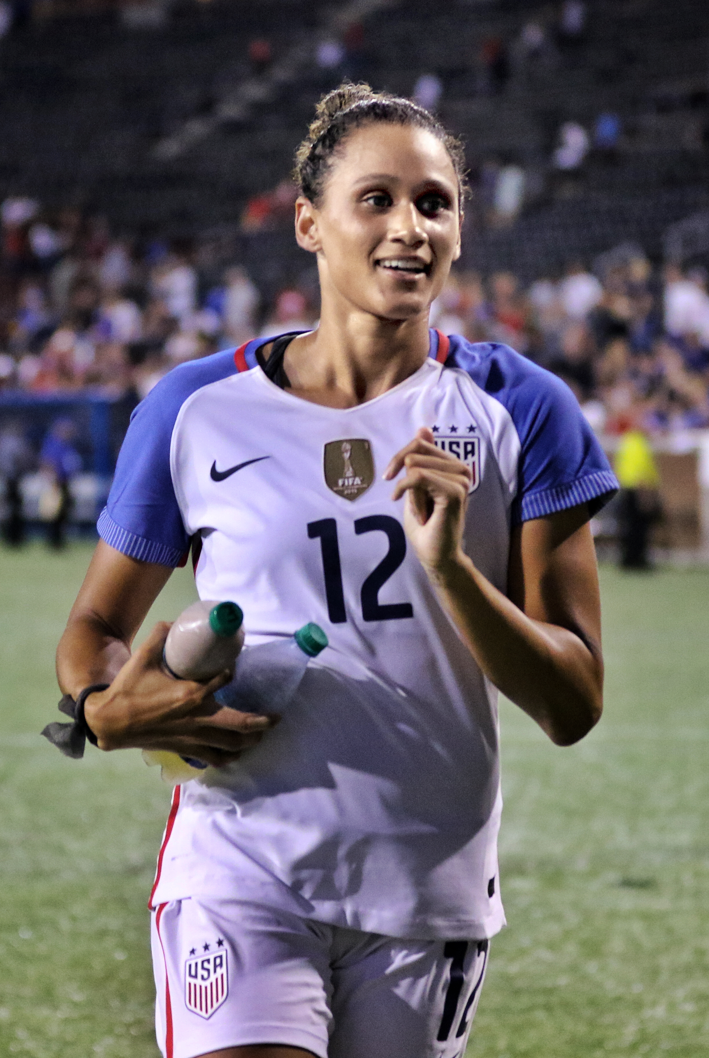 LynnWilliams